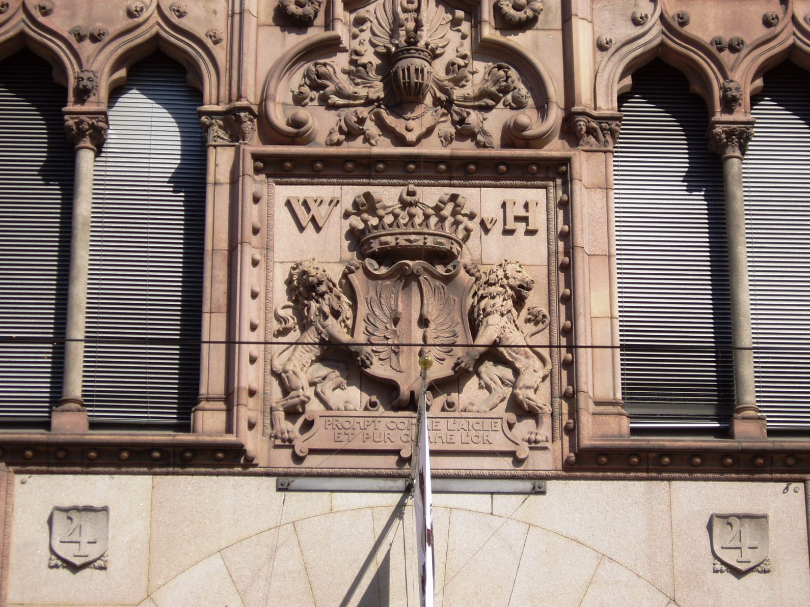 Fasaddeltalj (vapen), Hallwylska museet, Stockholm